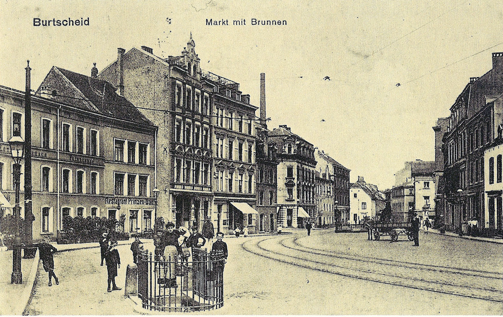 Thermalwasserbrunnen "Krinoline" auf dem Burtscheider Markt, ca. 1920